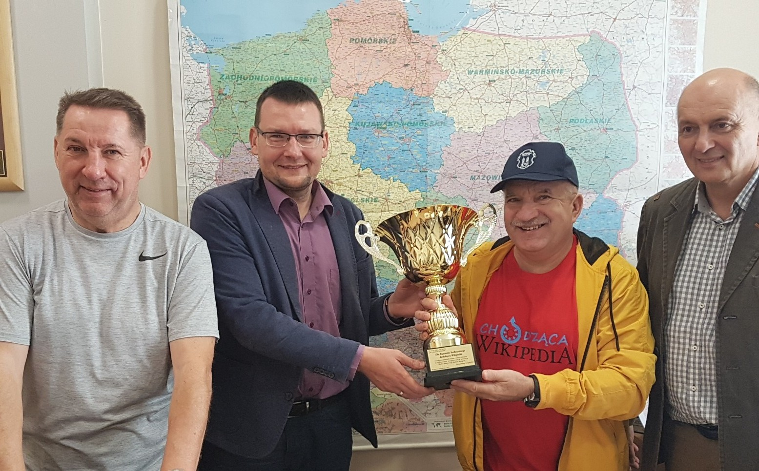 Zarząd Spójni Stargard SSA, trener Koziorowicz, redaktor Wikipedii (12.10.2018)